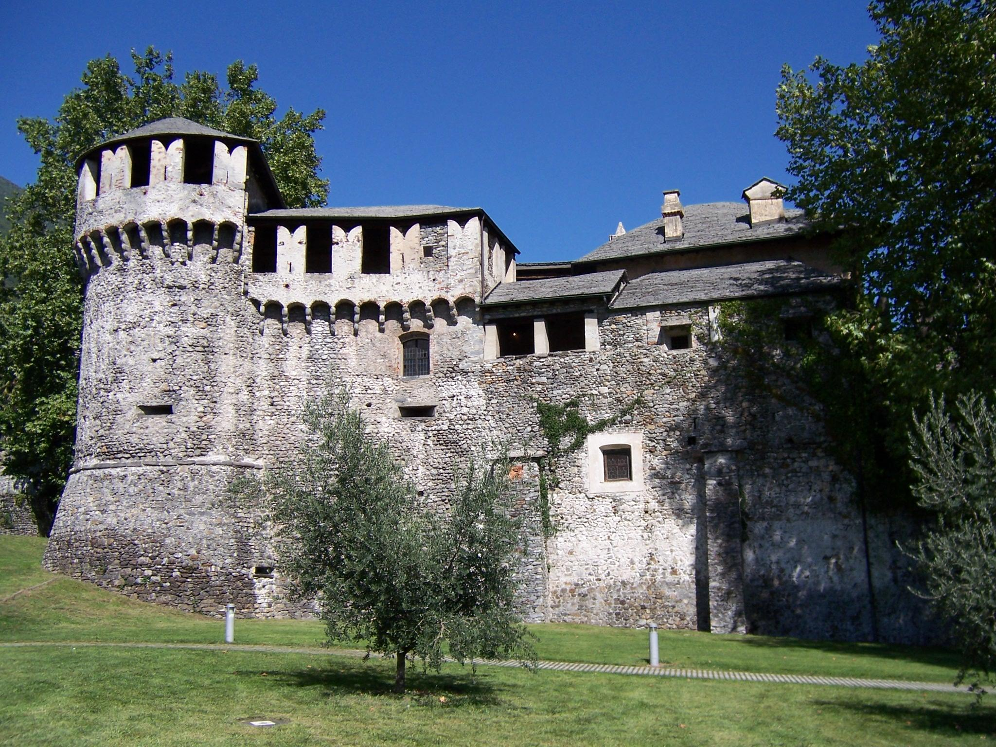 Castello Visconteo (von Westen) in Locarno (Kanton Tessin / Ticino, Schweiz)